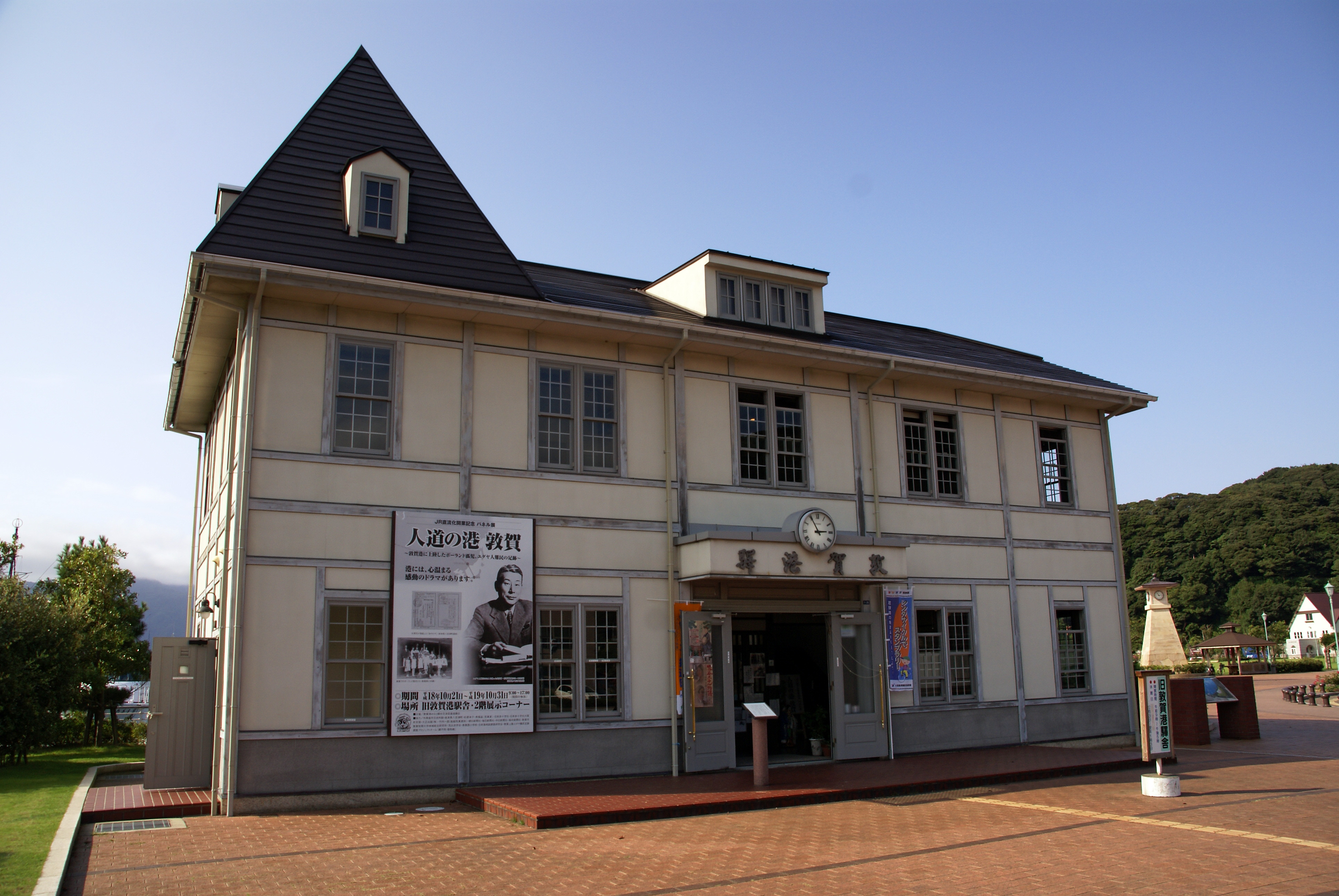 Old Tsuruga-port Station in Tsuruga, Fukui prefecture, Japan